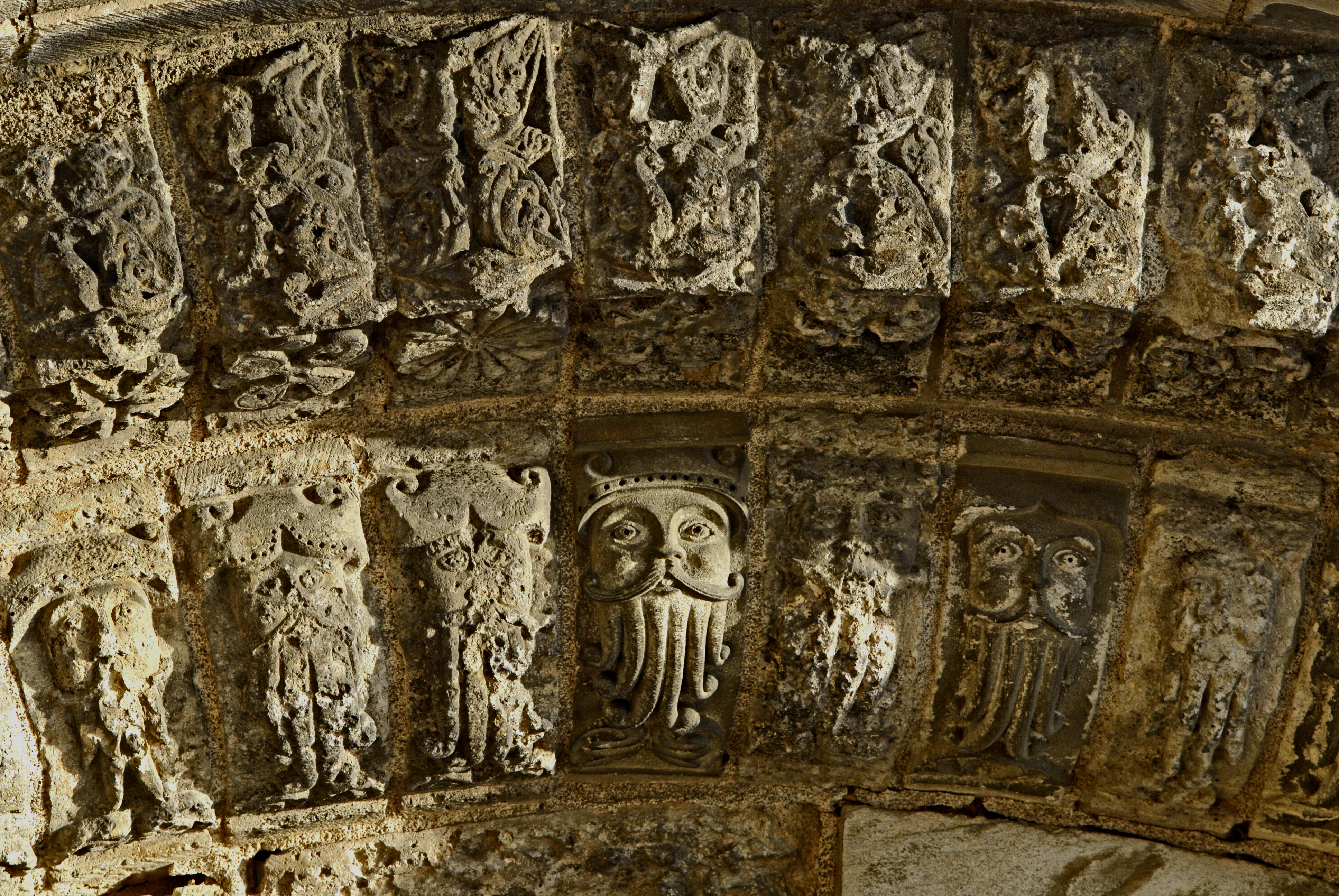 Saint-Jouin-de-Marnes, Detail 4. und 5. Archivoltenbogen